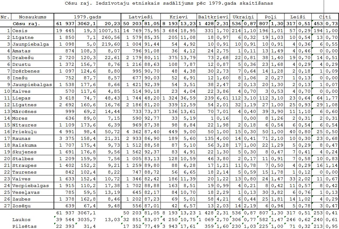 Latvijas 1979. gada tautas skaitīšanas dati